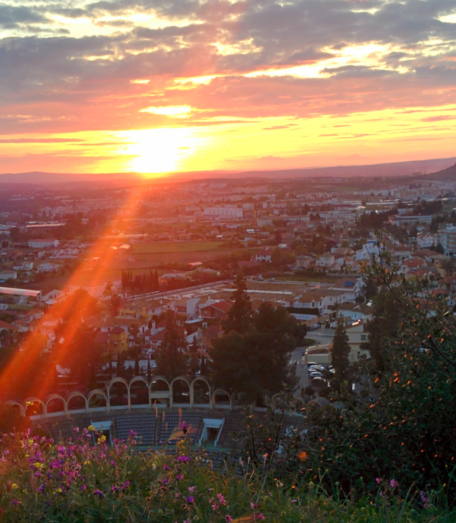 Vista de la ciudad de Cabra (Córdoba)